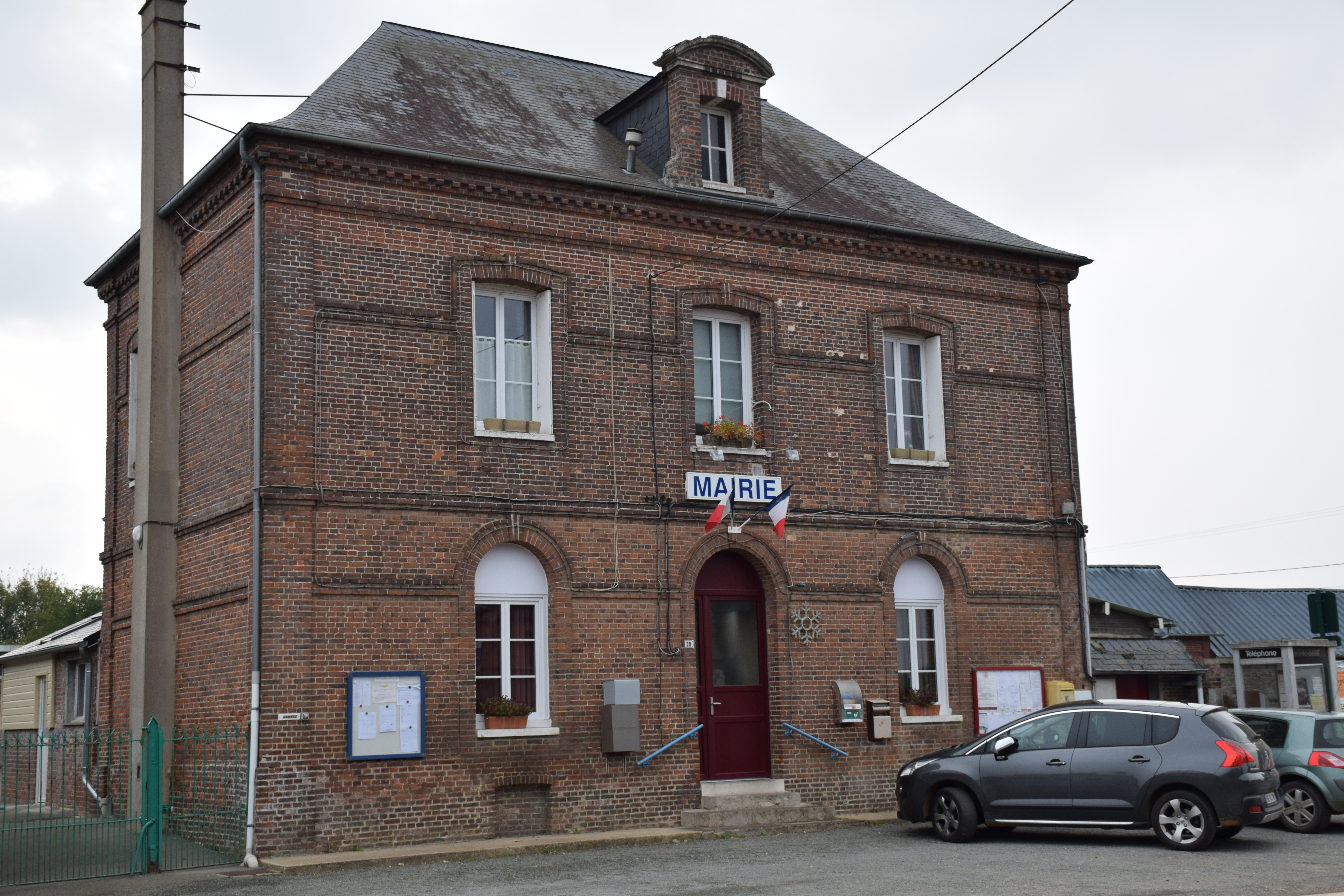 Mairie